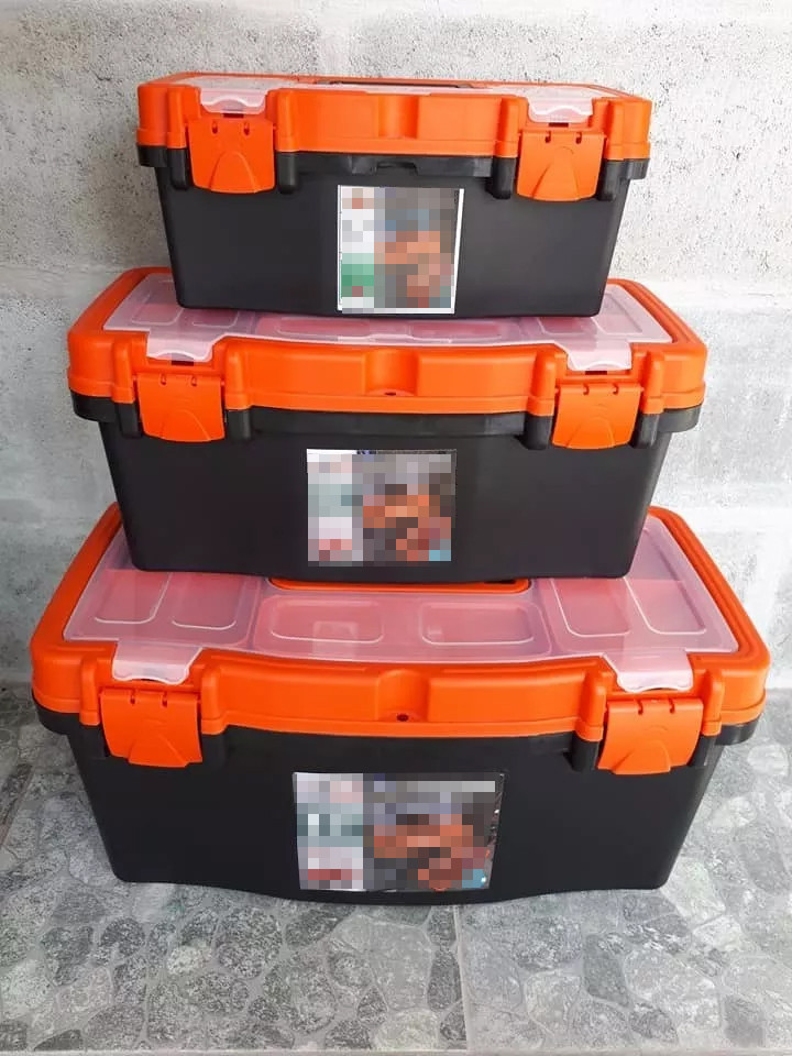 Se puede apreciar la diferencia entre una caja de 12" (pulgadas), 16" y 19".